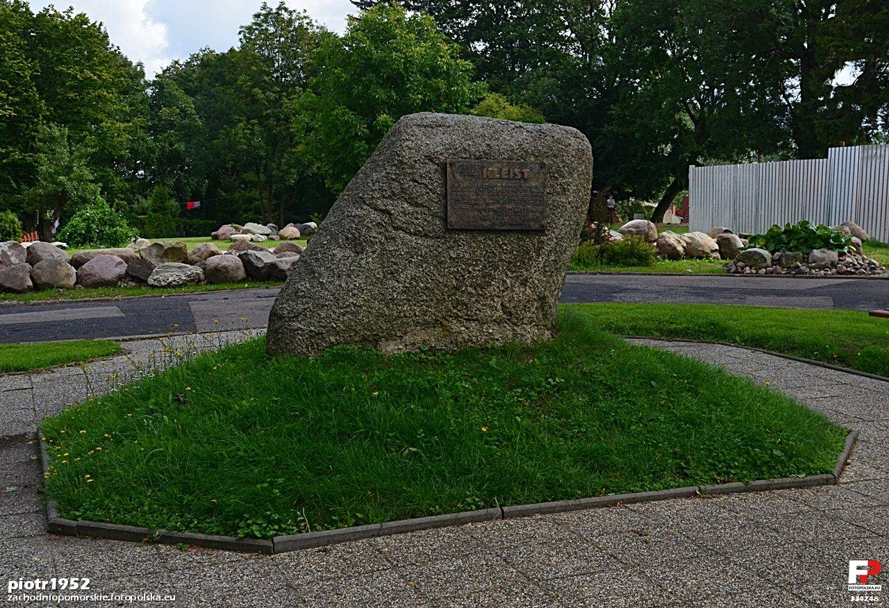 W 300-tną rocznice urodzin mieszkańcy Kamienia Pom. 10. VI AD. 2000 dla Ewald Georg Jurgen von Kleist